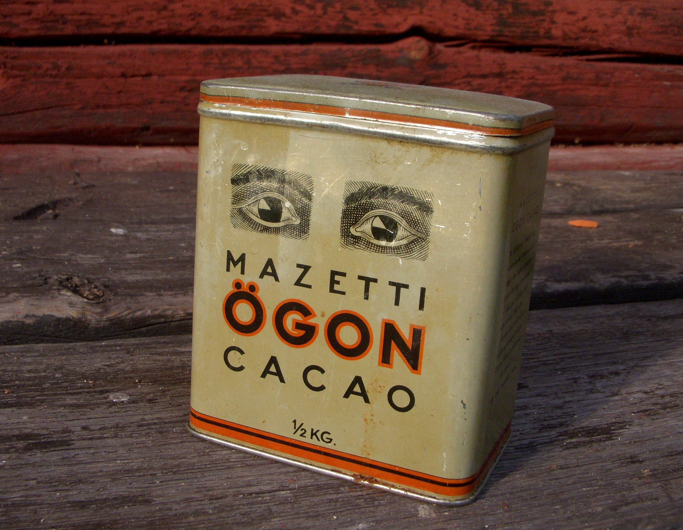 En burk "MAZETTI ögon cacao"